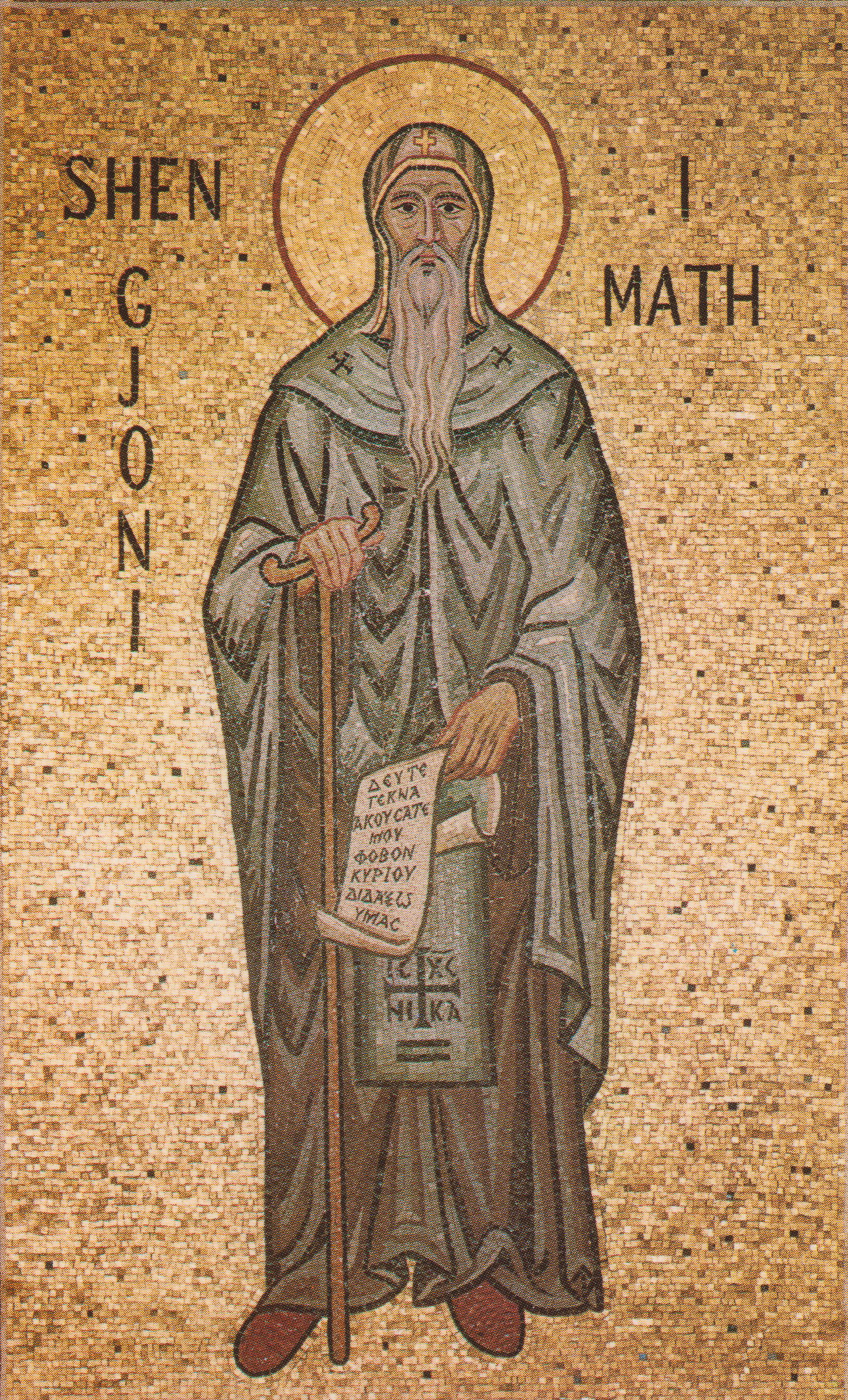 Mosaico di Sant'Antonio, XX sec., Chiesa di Sant'Antonio il Grande (Shën Gjoni i Math), Piana degli Albanesi